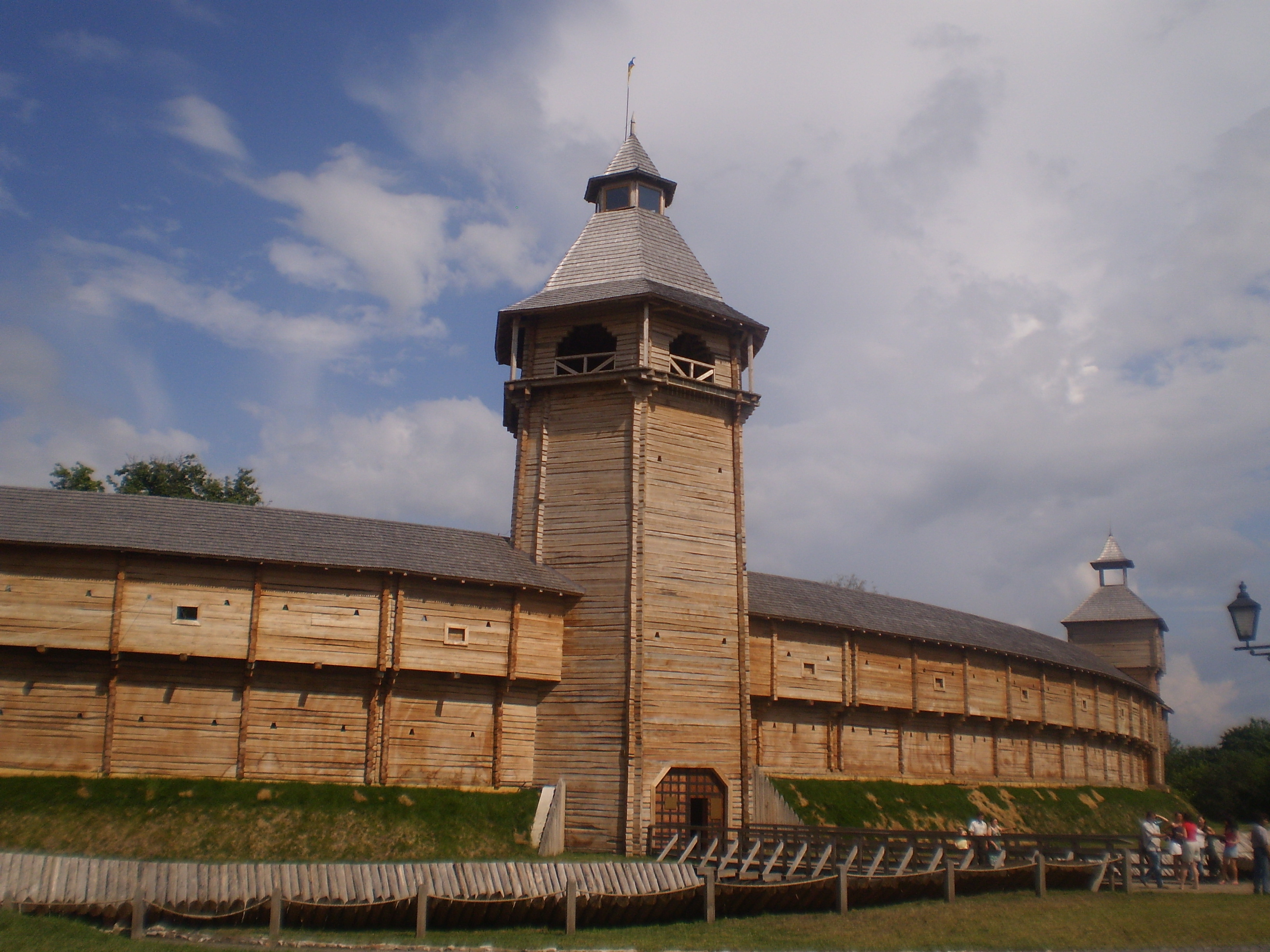 Поселення укріплене багатошарове «Батуринська фортеця», Батурин, між вулицями Партизанська, Петровського, Радянської та провулками Партизанськім і Петровського